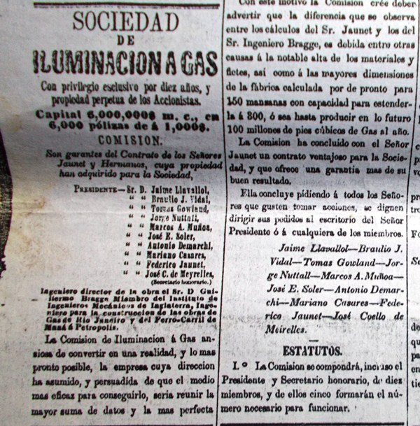 articulo de "La Tribuna 14 de octubre 1854